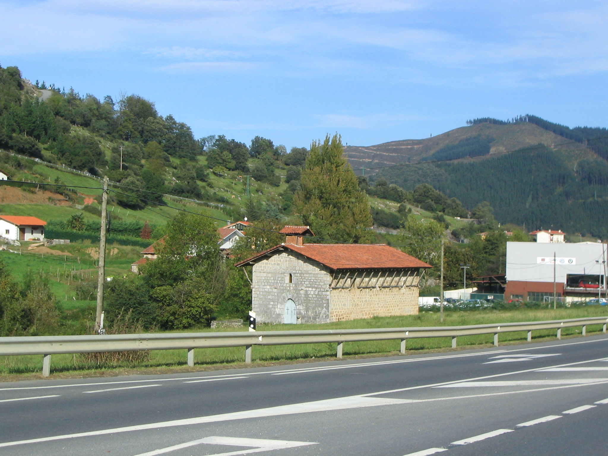 Ermita santa Cruz de Markina, Vizcaya, País Vaco, España.